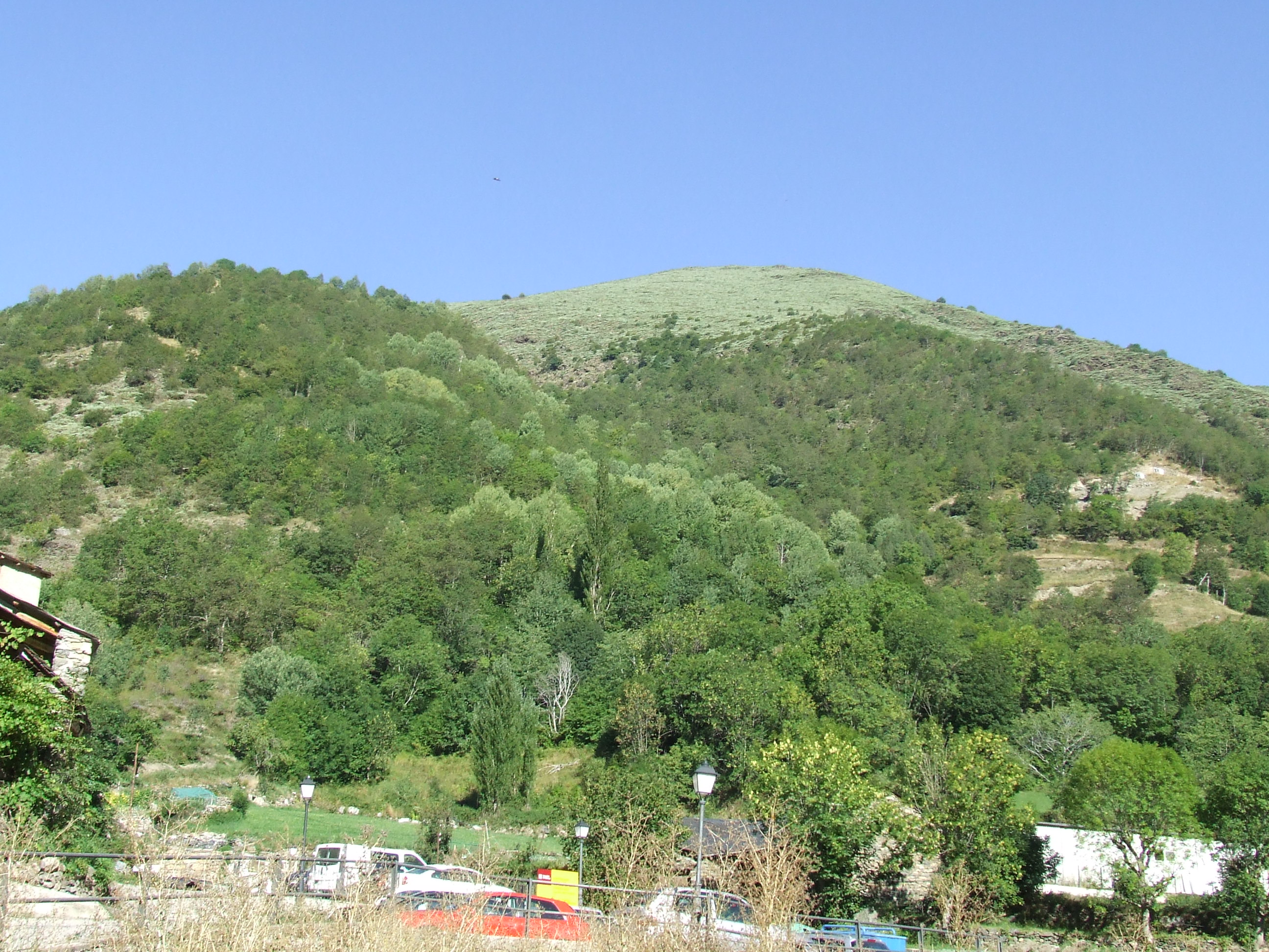 Serrat d'Escobets des d'Espui (la Torre de Cabdella, Pallars Jussà)